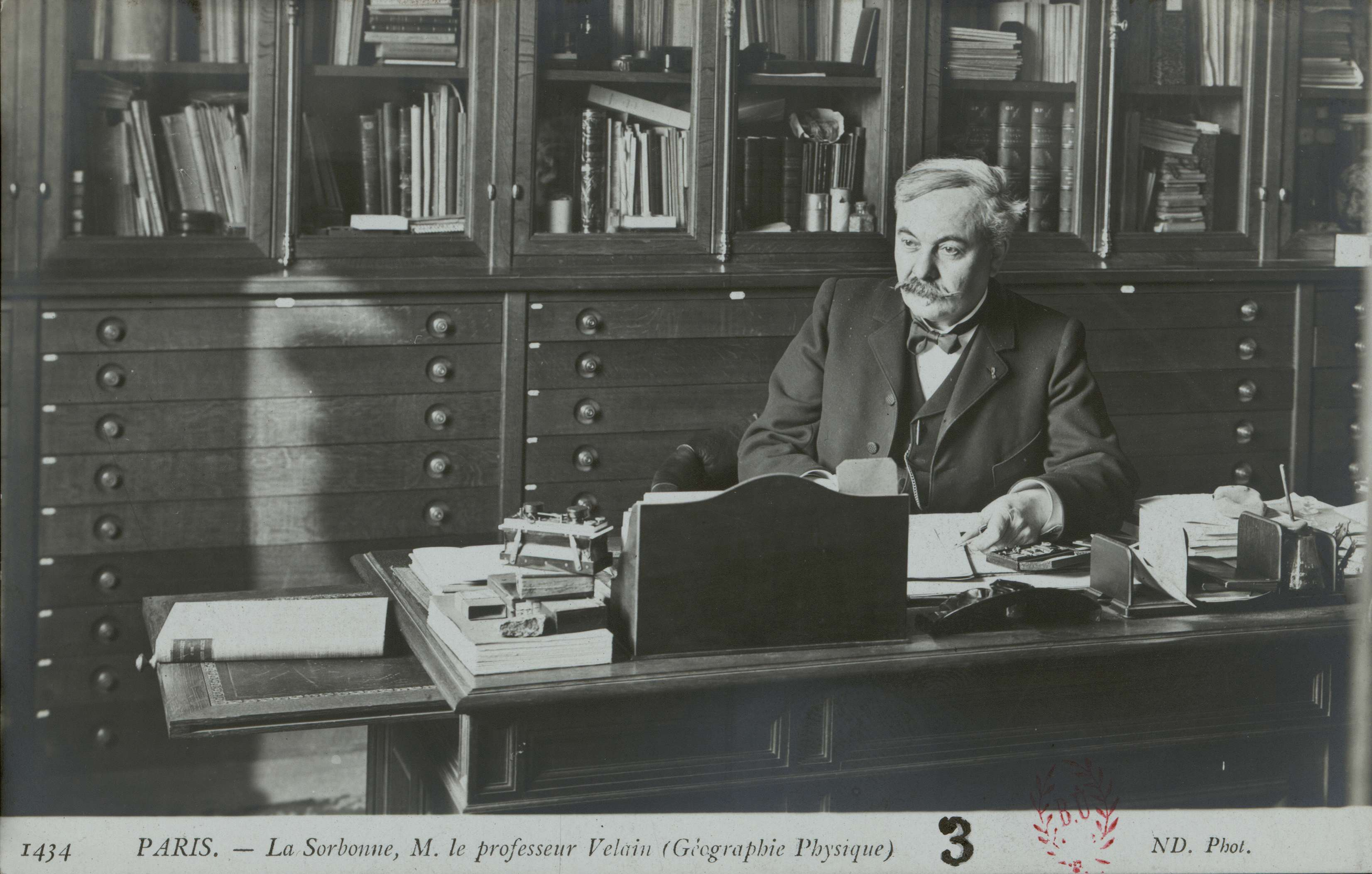 Carte postale photographique